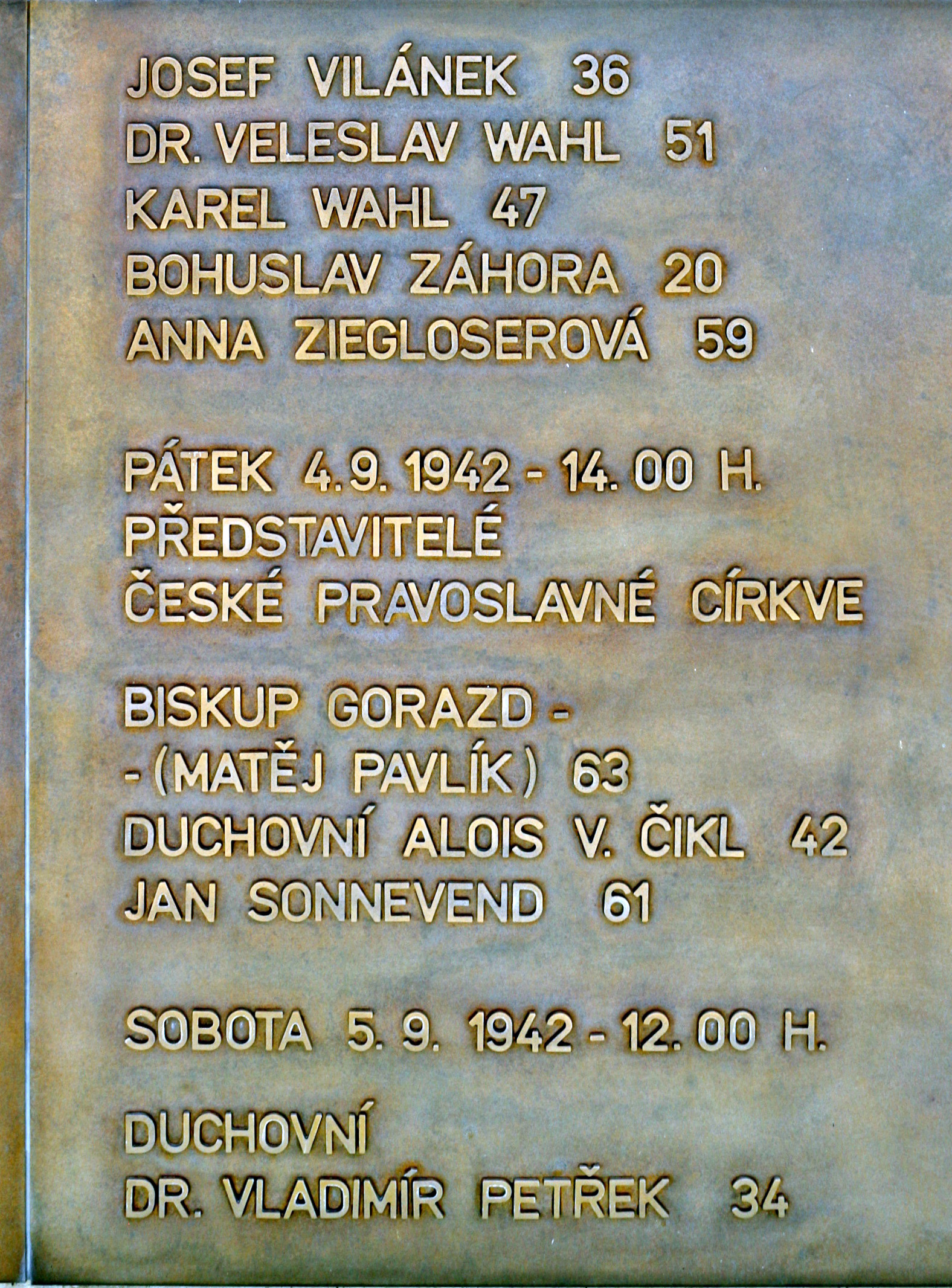 Kobylisy památník zastřeleným osobám